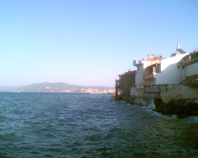 A seaside panorama in Mudanya, Bursa, Turkey